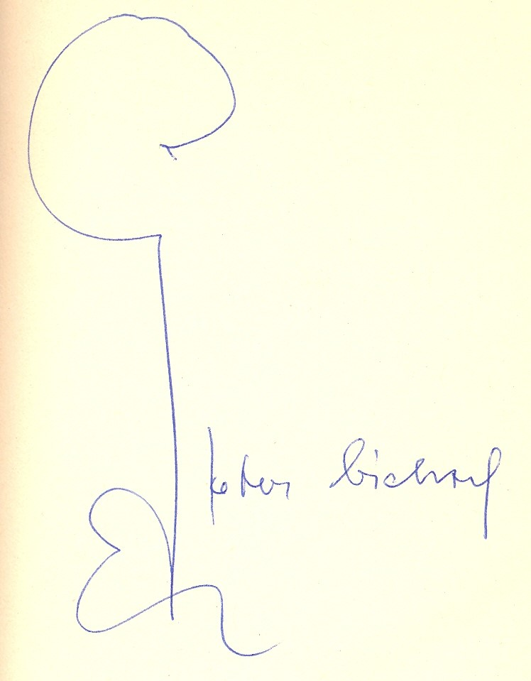 Autogramm von Peter Bichsel